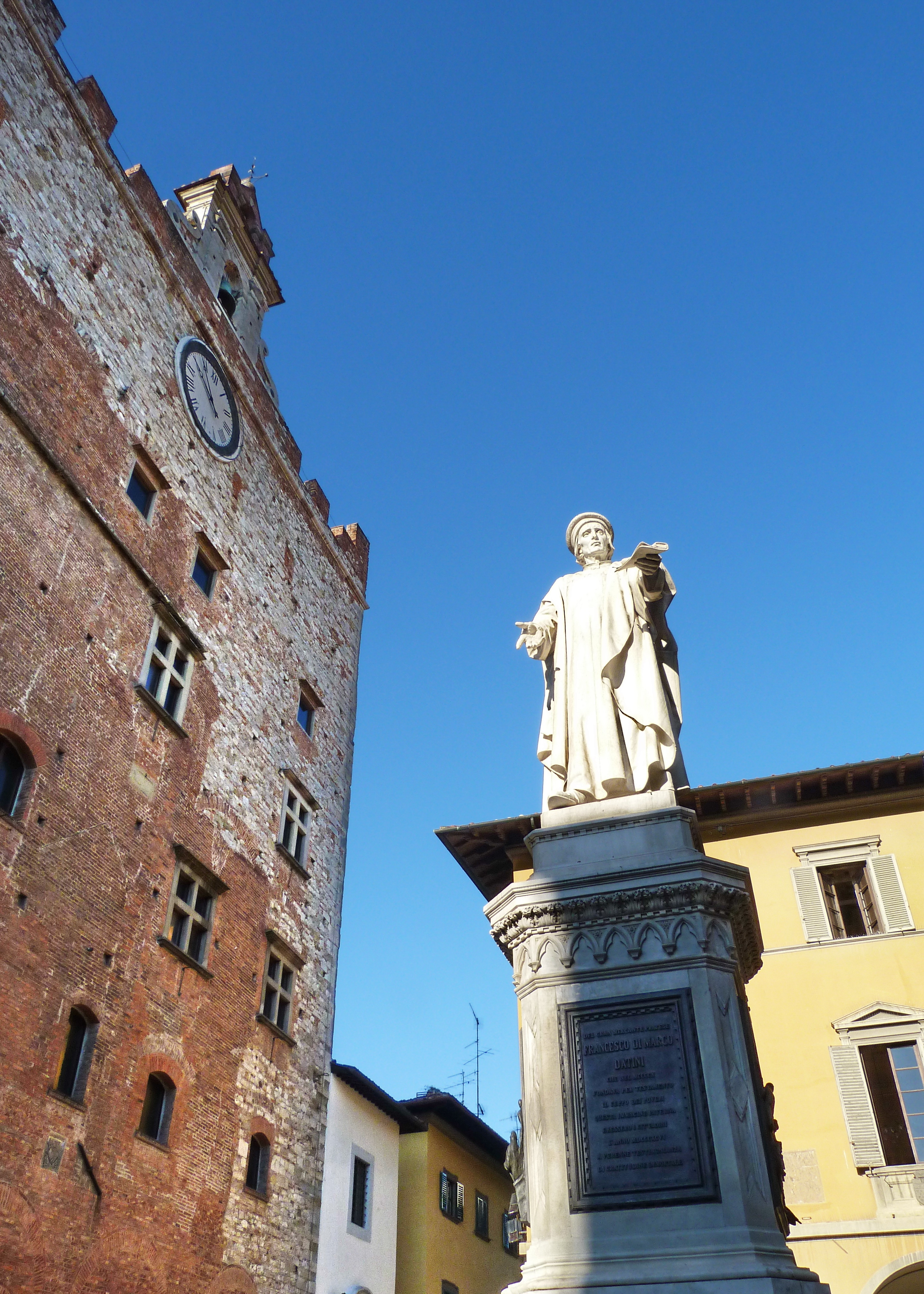 Scorcio del Palazzo Pretorio con la statua di Francesco Datini, Prato, Toscana, Italia This is a photo of a monument which is part of cultural heritage of Italy.